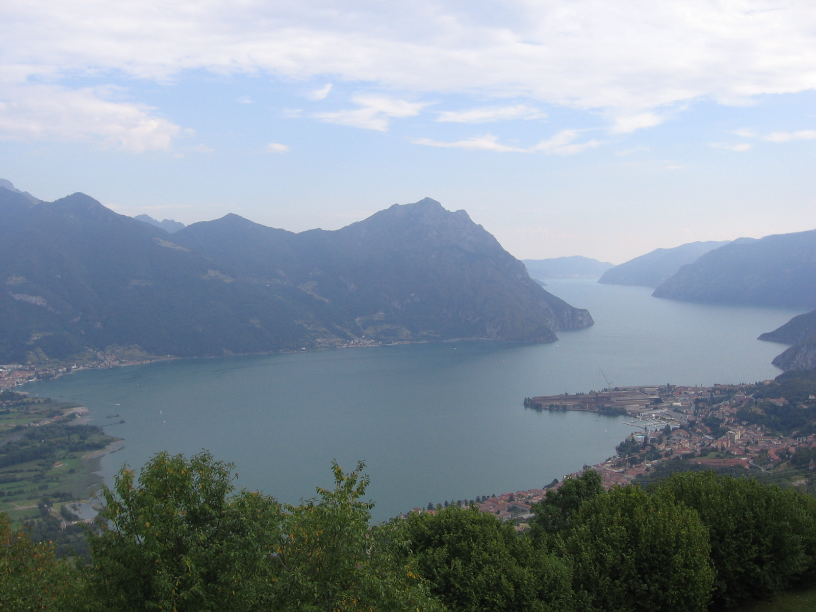 Vista del Sebino da Costa Volpino, Bergamo, Italy